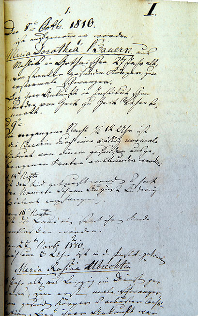 Acta der Entbindungsschule zu Leipzig von ihrer Eröffnung 8. Oct. 1810 bis 1813, Band I der Aufzeichnungen:Mit dem ausführlichen Eintrag der ersten Geburt am 9. Oktober 1810, 0.30 Uhr, sowie die Aufnahme der zweiten Patientin am 27. November 1810.